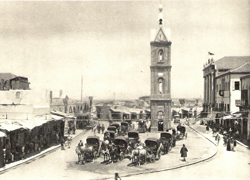 כיכר השעון ביפו, 1929 לערך